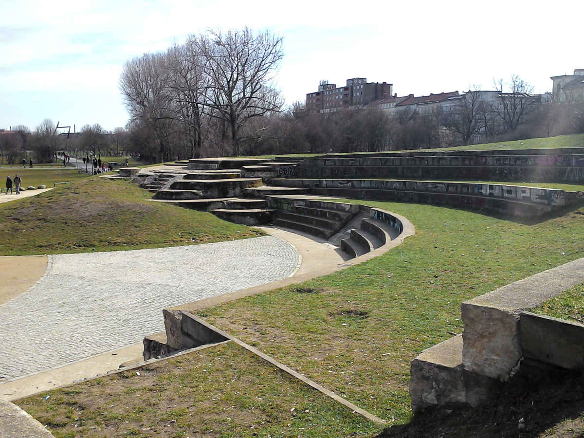 Terrassenartige Anlage auf dem ehemaligen Görlitzer Bahnhof, dem heutigen Görlitzer Park, die ursprünglich ein türkisches Naturphänomen darstellte und nach dessen Verfall heute einem Amphitheater gleicht.